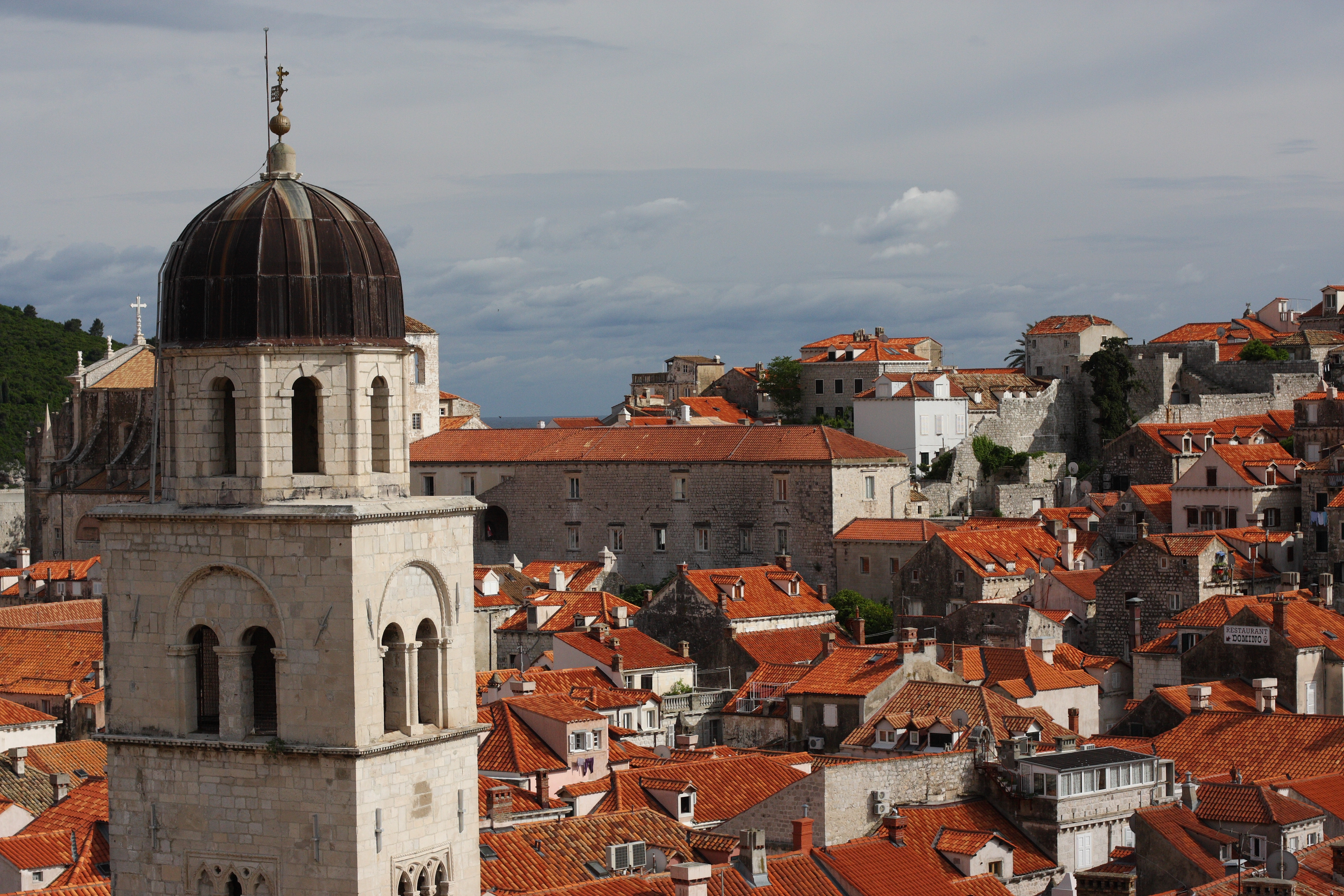 Dubrovnik, Croatia